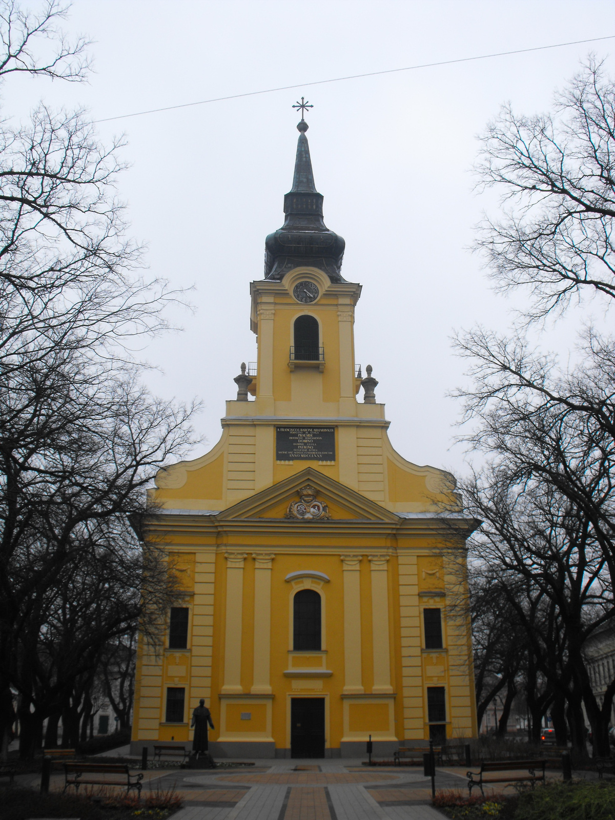 Belvárosi római katolikus plébániatemplom (Gyula, Harruckern tér) This is a photo of a monument in Hungary, Identifier: 2465